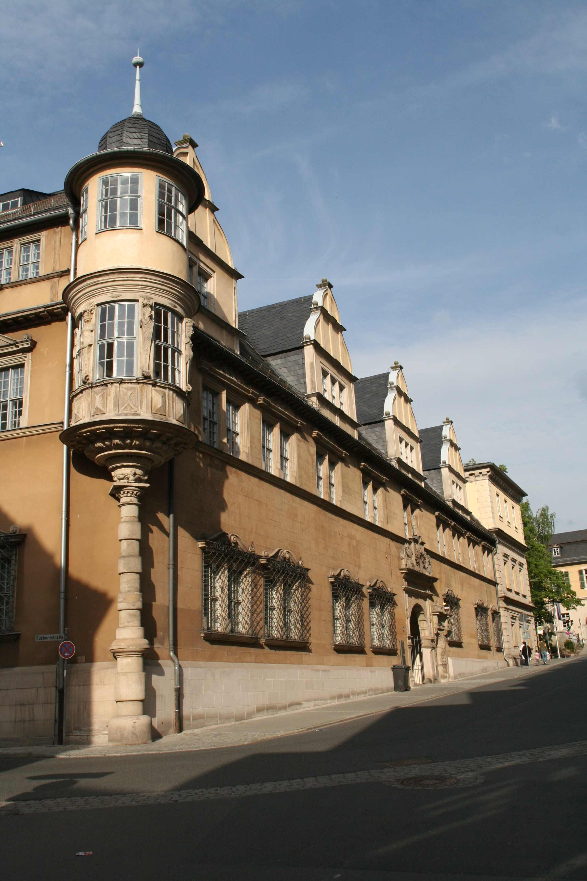 Schloss Ehrenburg CoburgSüdfassade Schloss Ehrenburg in Coburg